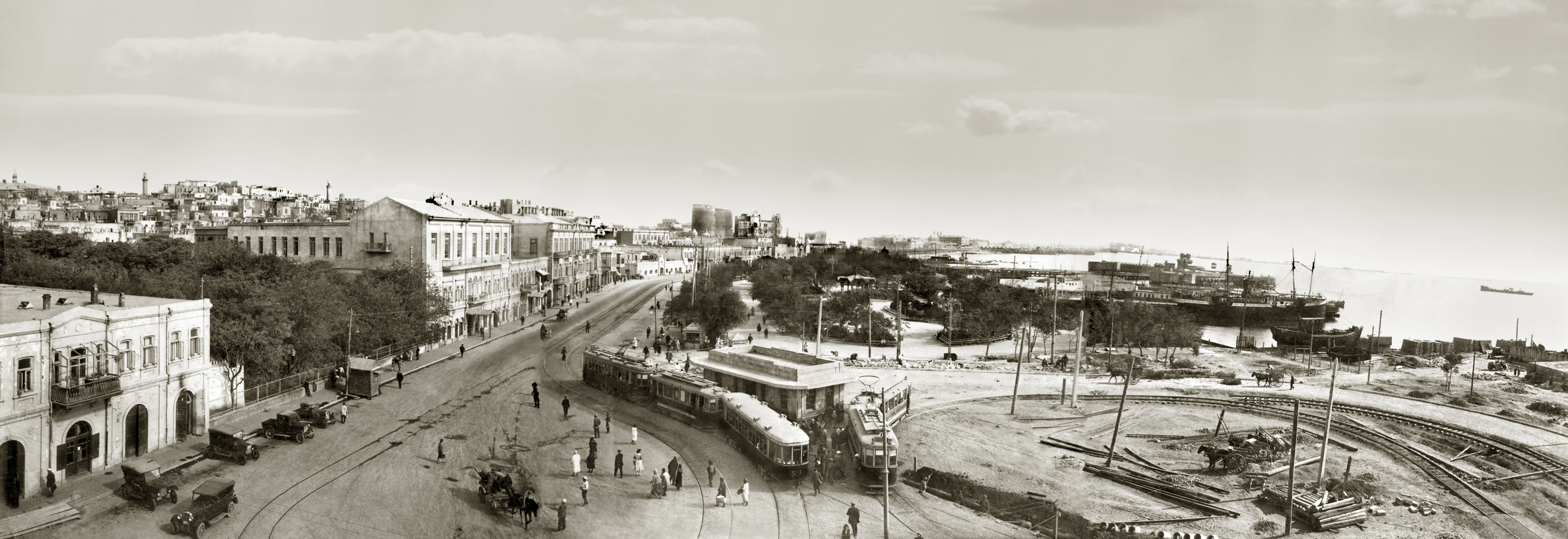 Бакинский бульвар. Территория, на которой в 1915 - 1918 гг. находилась Бакинская офицерская школа морской авиации.